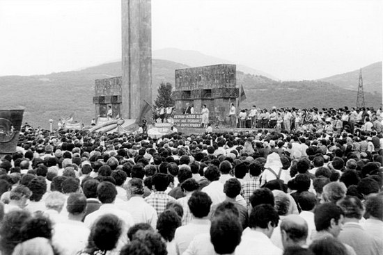 Շարժում, 1988